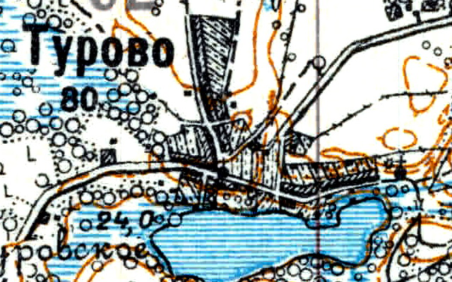 Топографическая карта Ленинградской области, квадрат Vc-29 (Батецкая), деревня Турово